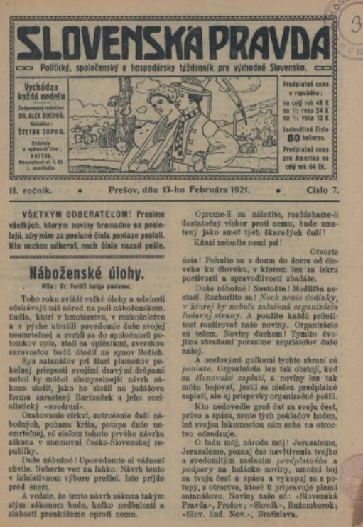 Titulný list týždenníka Slovenská Pravda, ktorý vychádzal na Slovensku v 20. a 30. rokoch 20. storočia